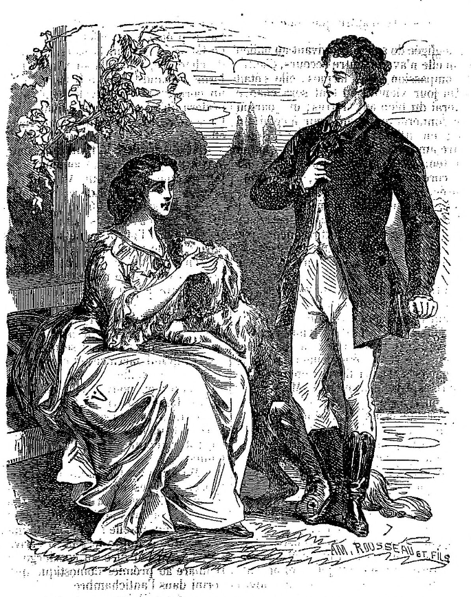 Illustration de Tony Johannot pour une réédition du roman "Indiana" de George Sand chez Hetzel (Paris) en 1861. Indiana et Raymon de la Ramière pendant une scène de la première partie du roman.